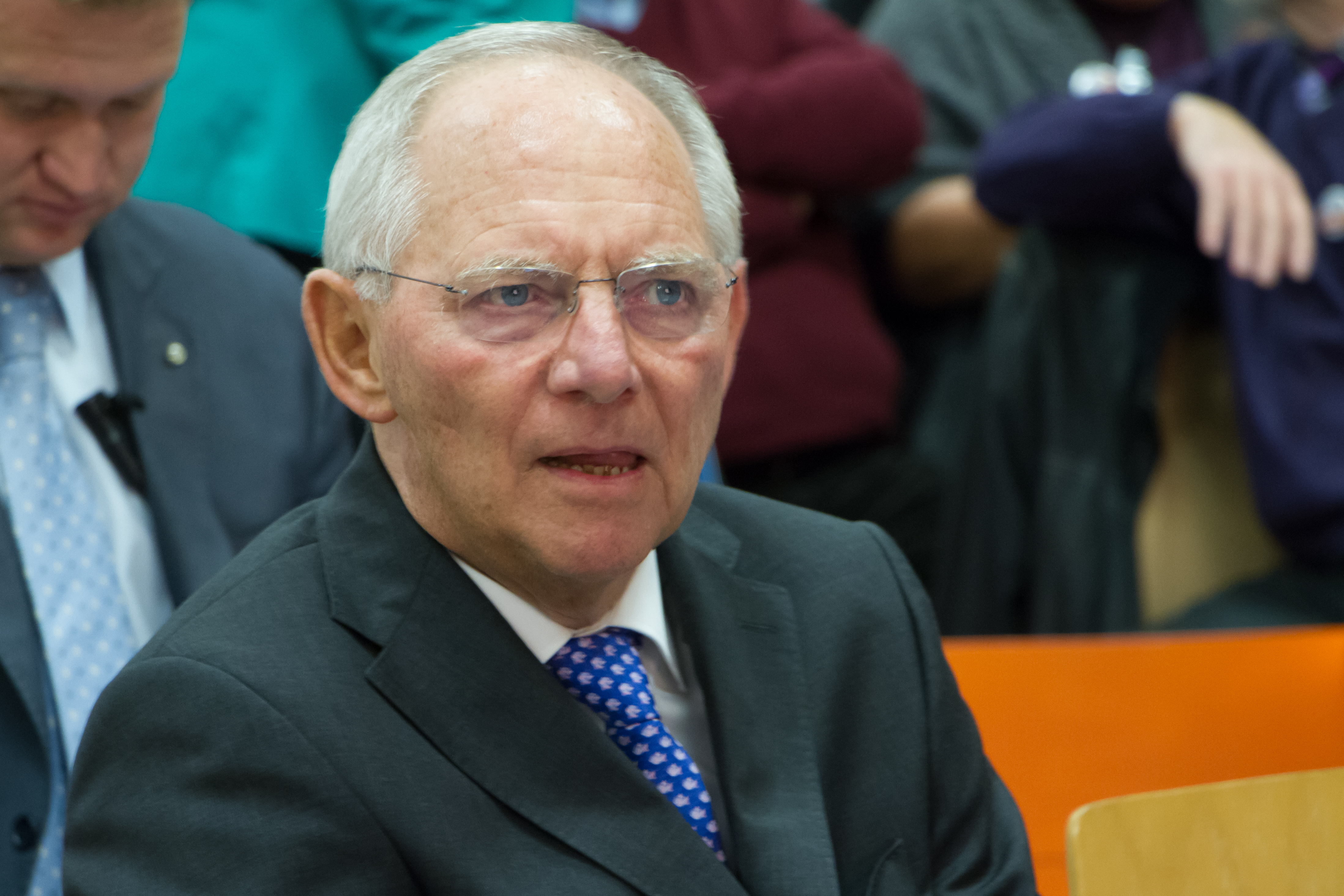 Serie: Regionalkonferenz der CDU Baden-Württemberg am 21. November 2014 in Appenweier zur Vorstellung der Bewerber für die Spitzenkandidatur bei der Landtagswahl 2016 Bild: Wolfgang Schäuble